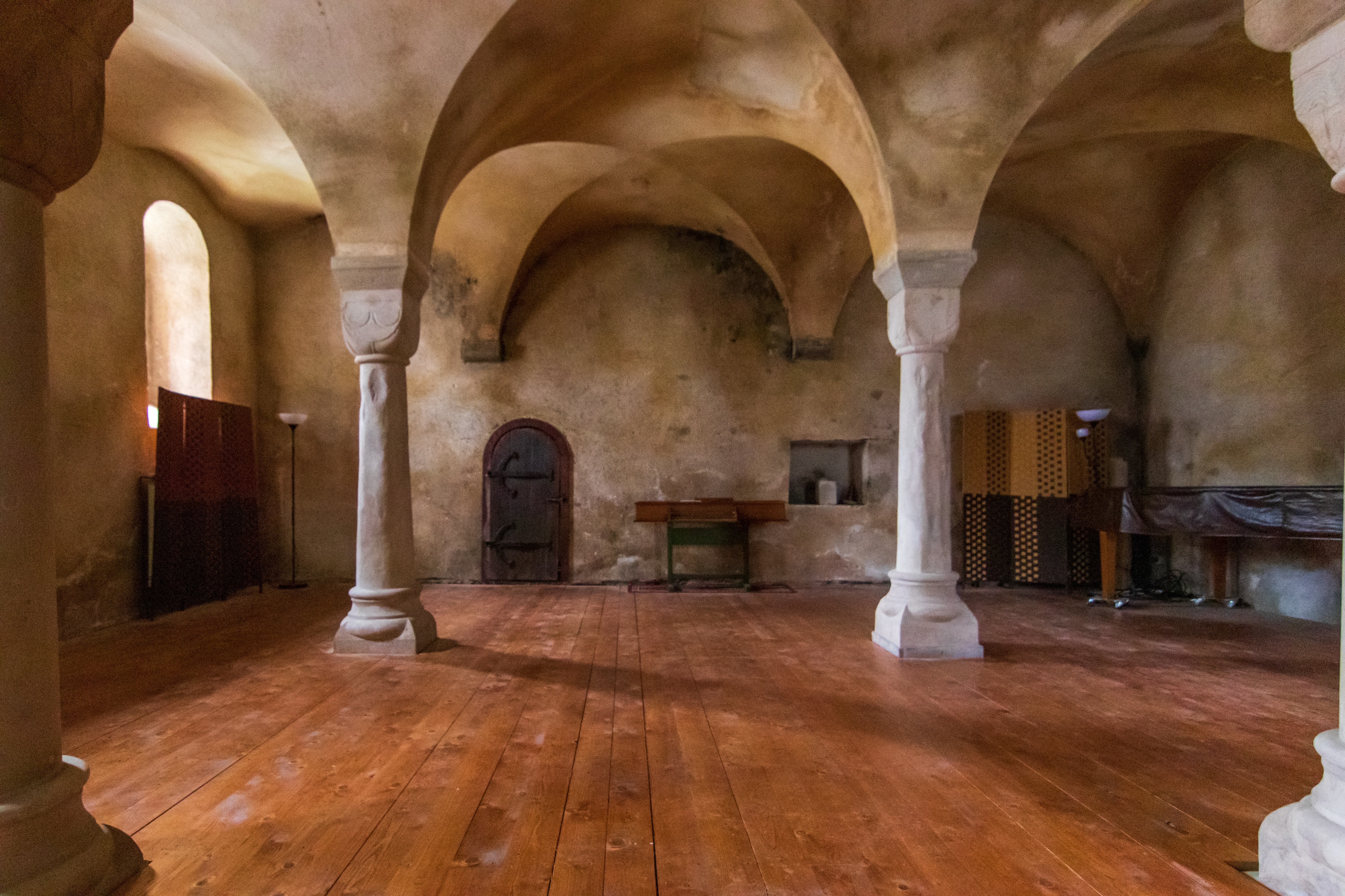 Kloster Ilsenburg – Blick in den Brüdersaal